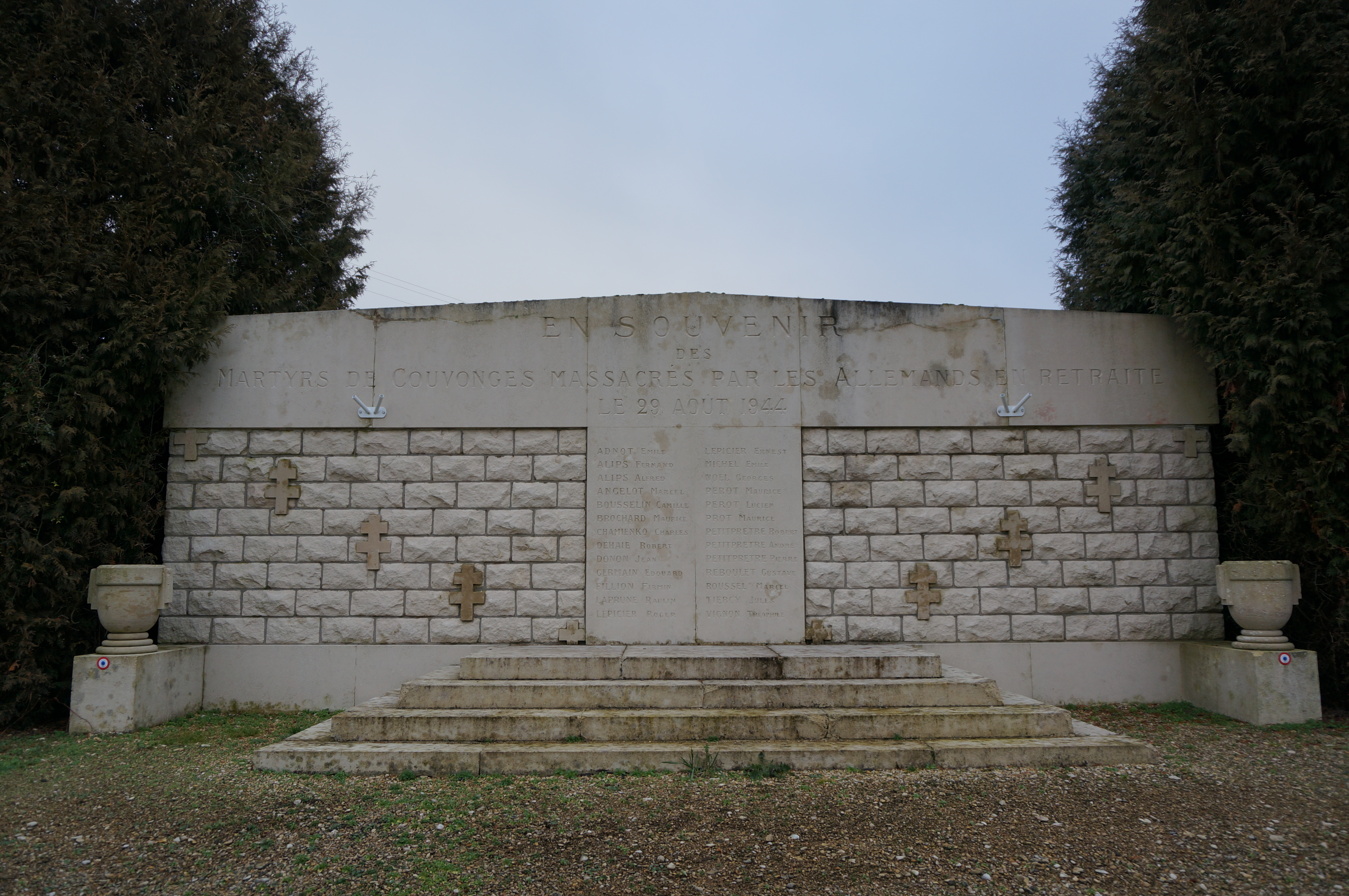 Vues de Couvonges, memorial des fusillés, Saulx massacre